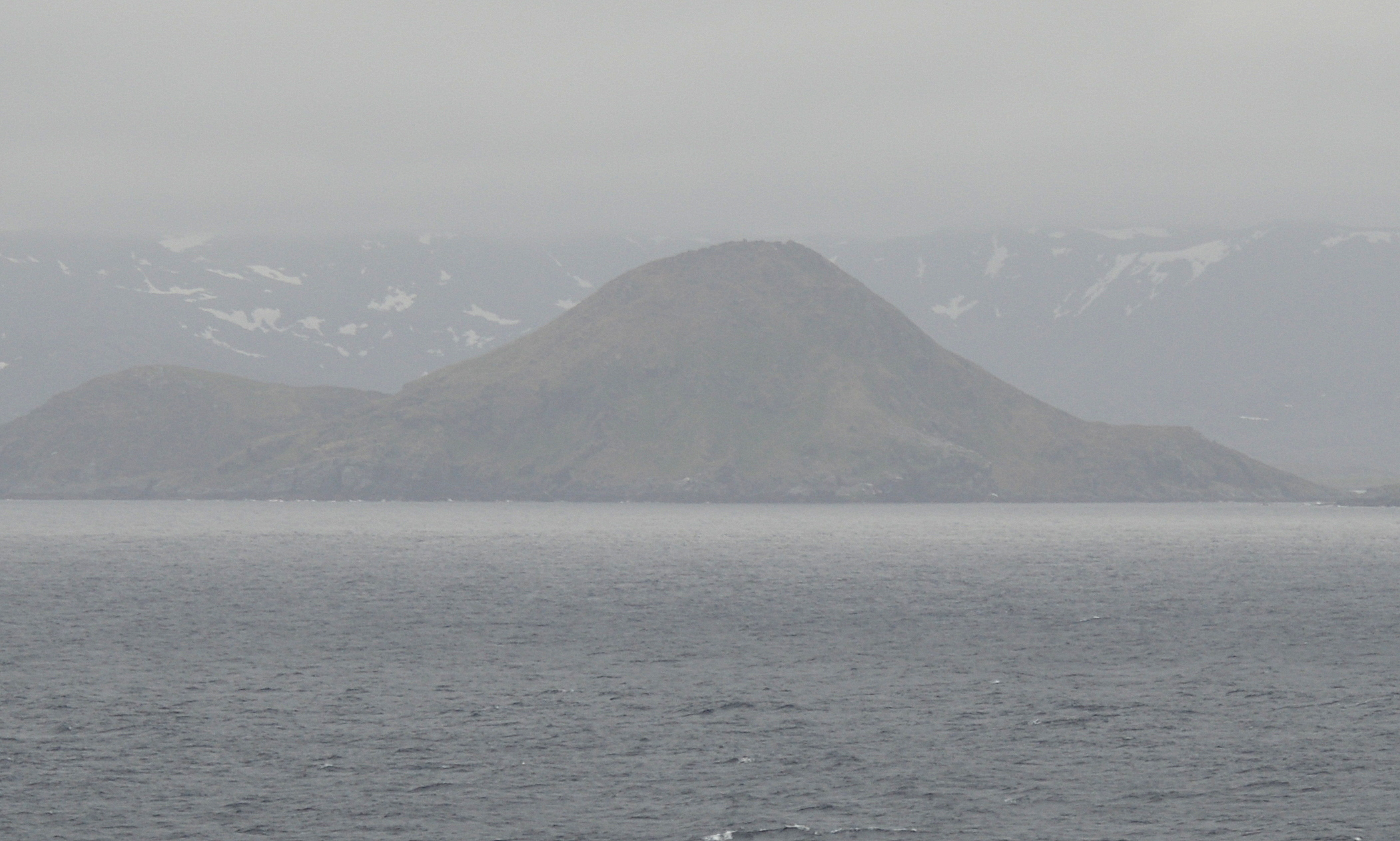 Kjerkestappen